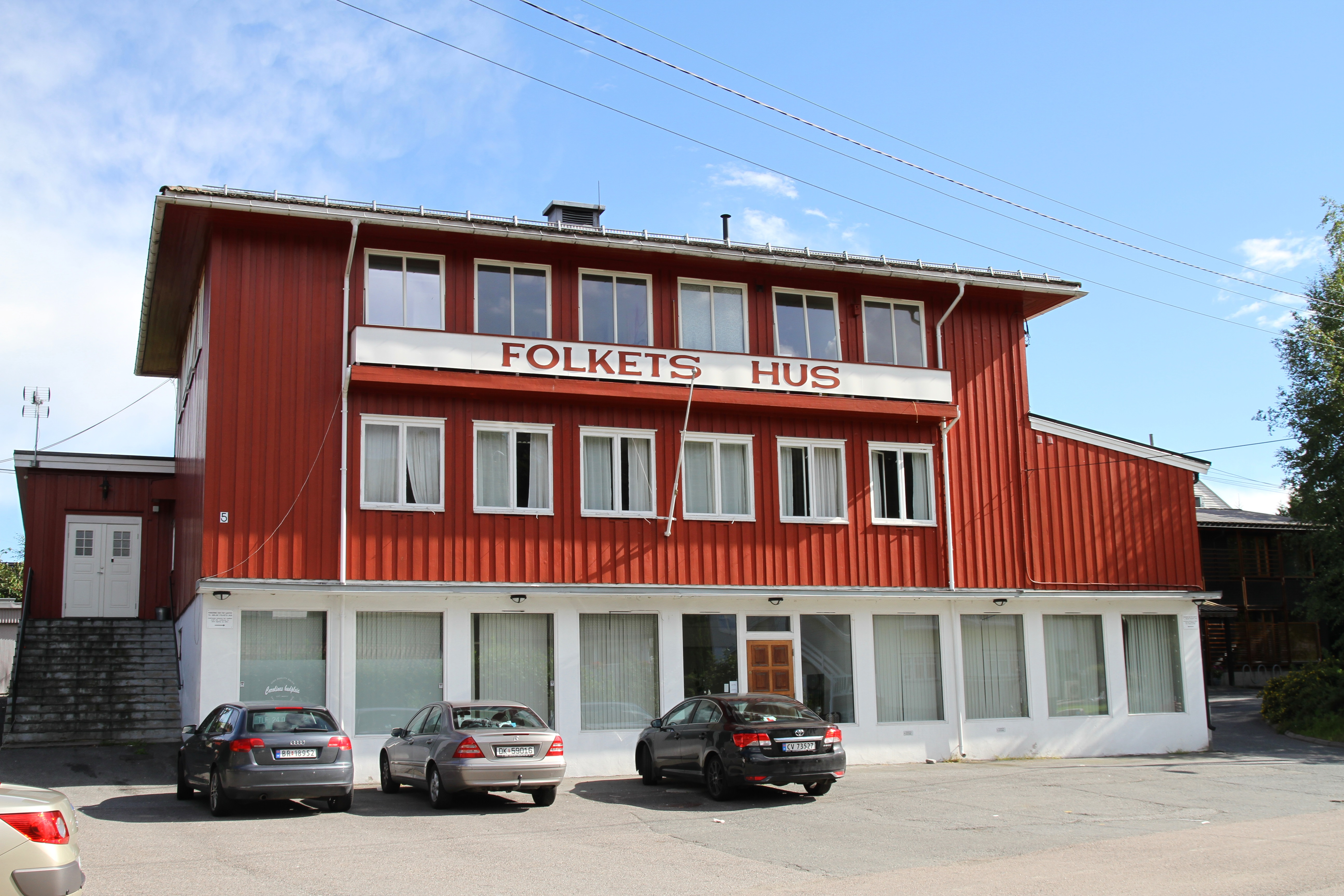 Folkets Hus i Smedbergveien på Abildsø.